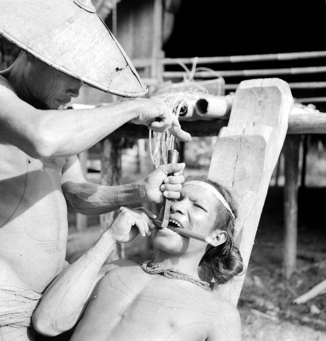 Negatief. Tandenvijlen